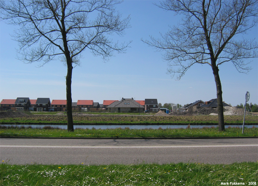 Dokkum, De Trije Terpen.